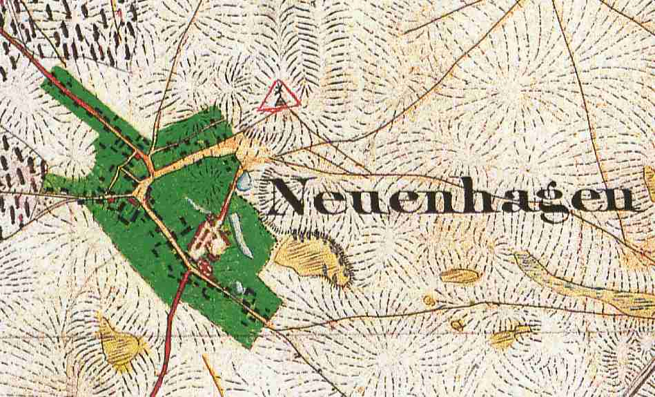 Neuenhagen, Ortsteil der Stadt Bad Freienwalde, Landkreis Märkisch-Oderland, Brandenburg, Deutschland, Ausschnitt aus dem Urmesstischblatt 3150 Oderberg von 1844